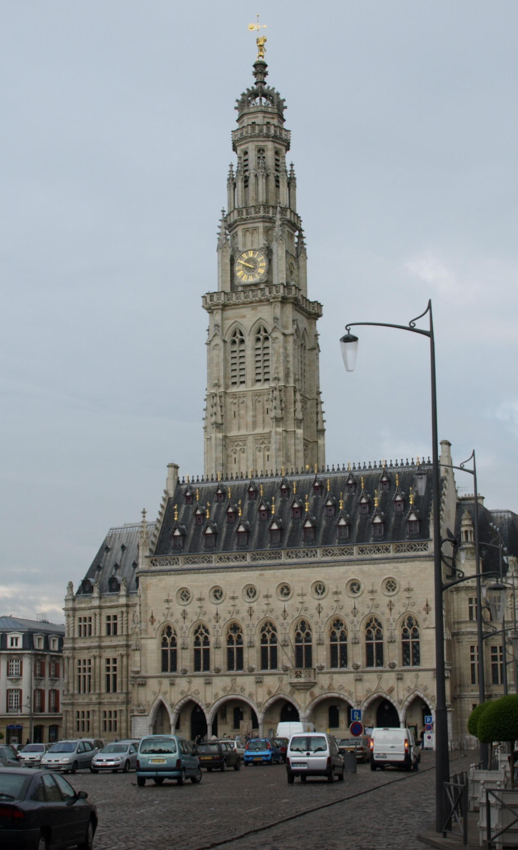 A Arras, sur la place des Héros : l'Hôtel de ville (1501-1508) et le Beffroi (1463-1553)